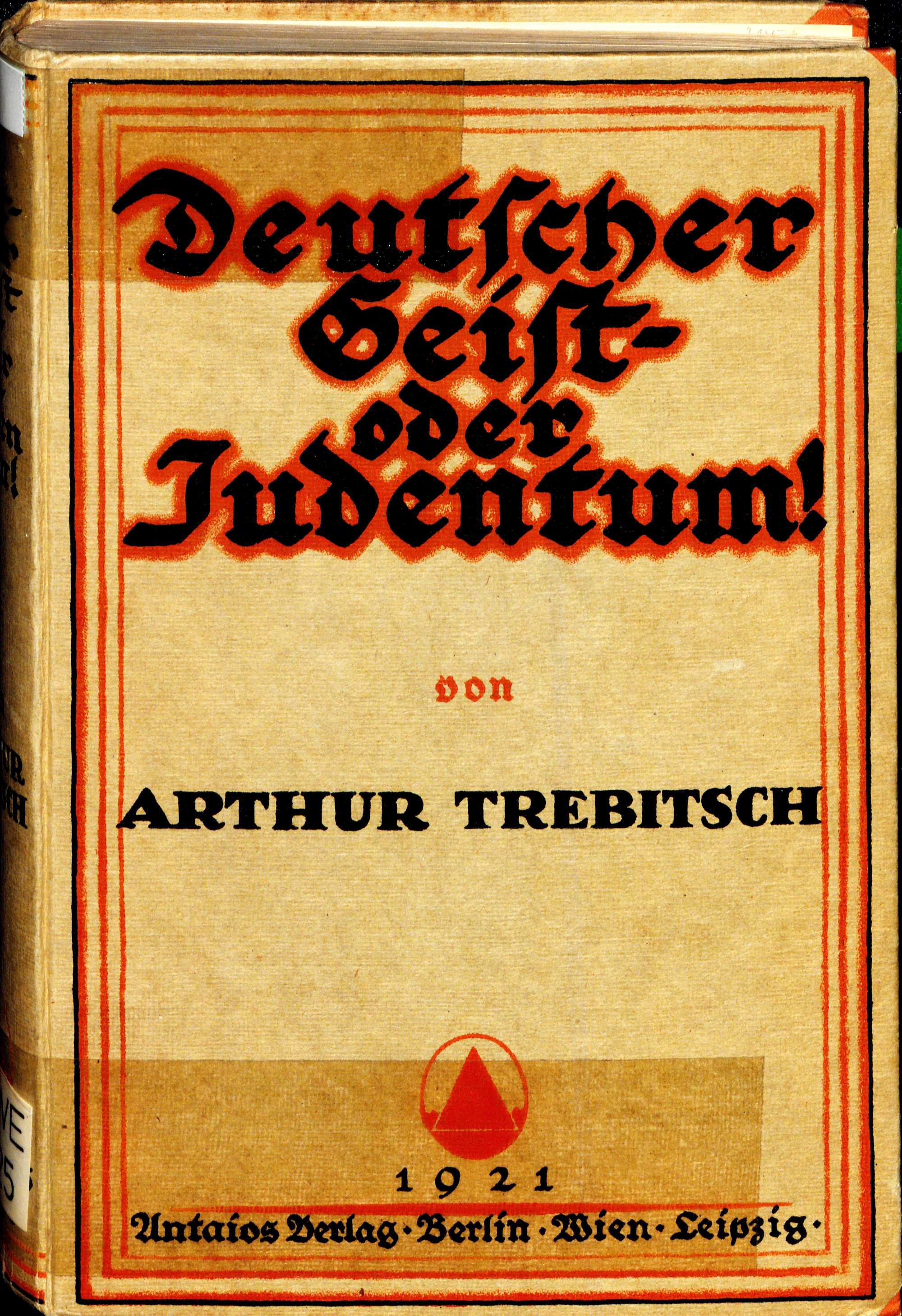 Arthur Trebitsch Deutscher Geist – oder Judentum! Der Weg der Befreiung. Berlin : Antaios, 1921